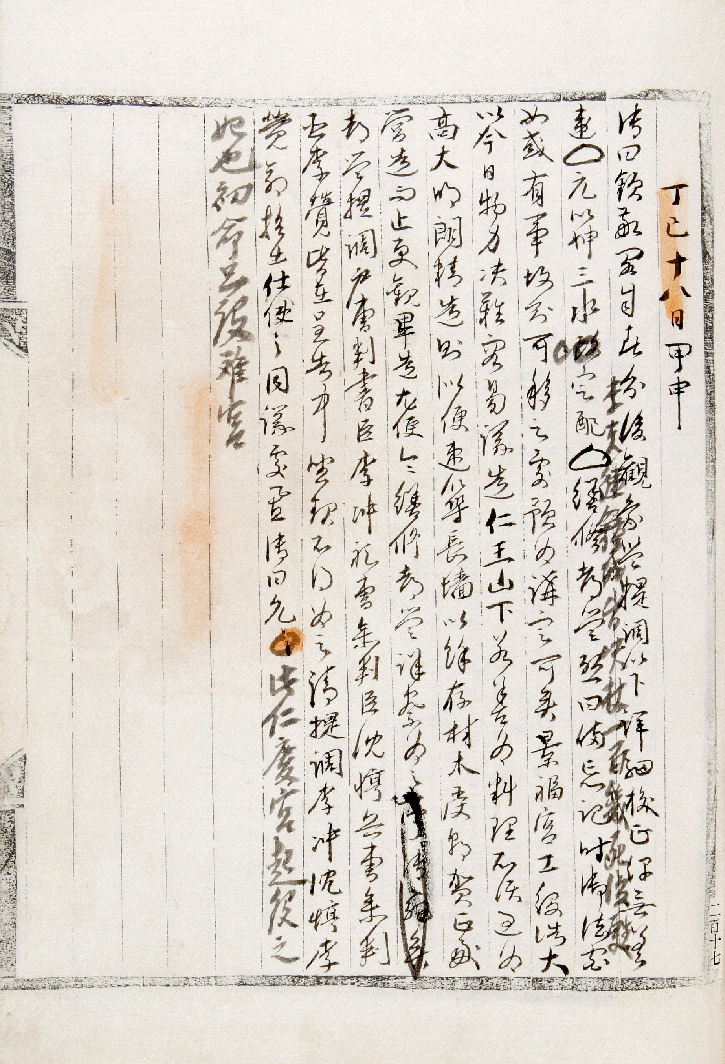 조선왕조실록 중초본은 먹 또는 붉은 먹과 검은 먹으로 수정해 삭제 또는 보첨(補添)한 부분이 많고 거의 초서로 쓰여 있다.1608년 2월부터 1623년 3월까지 광해군 재위 15년 2개월 간의 국정 전반에 관한 사실을 다루었다. 187권. 조선왕조실록 가운데 유일하게 중초본(中草本, 太白山本) 64책과 정초본(正草本, 鼎足山本) 39책의 두 종류가 남아 있다. [광해군일기 [光海君日記] (한국민족문화대백과, 한국학중앙연구원)] 이 내용은 인왕산에 궁궐터를 정한 기록이다.